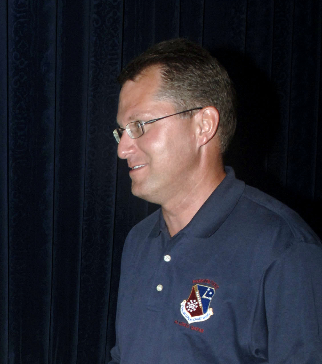 David Pelzer.